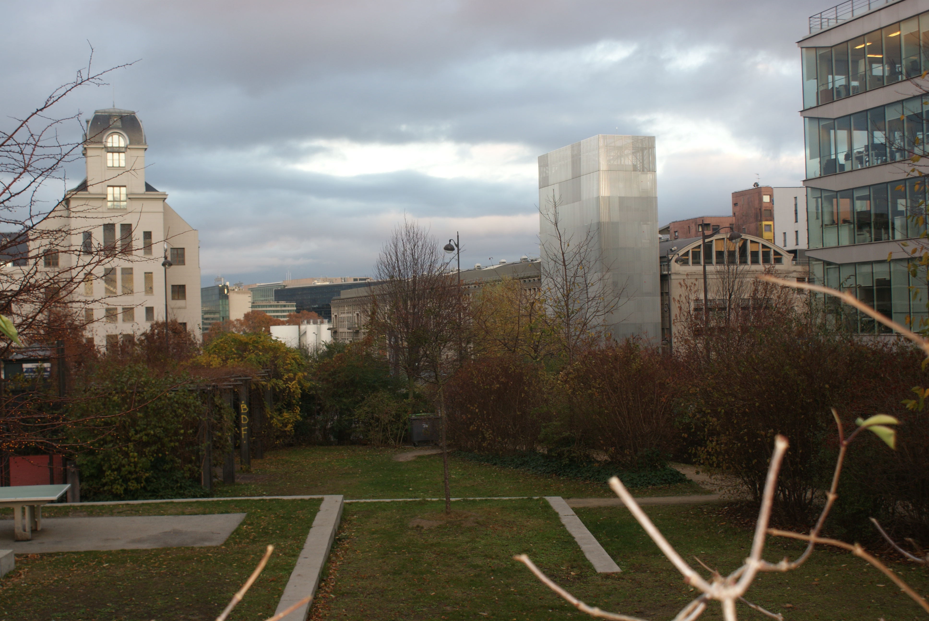 Le Campus Paris Rive Gauche : les Grands Moulins de Paris et la Tour Voltaire. Les Jardins Abbé-Pierre - Grands-Moulins sont en avant-plan. Vue prise en 2018.